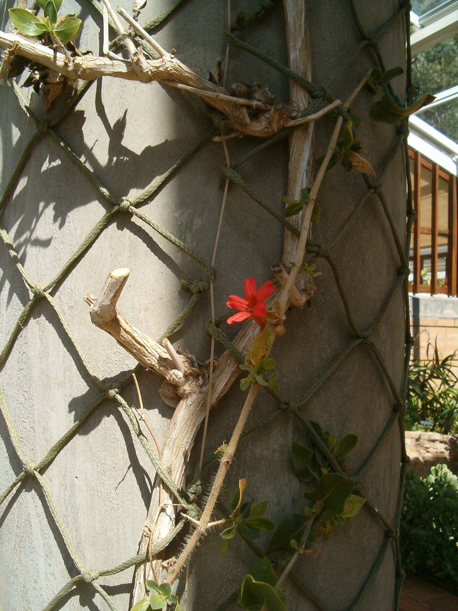 At Kirstenbosch National Botanical Gardens Name Petalidium rubescens